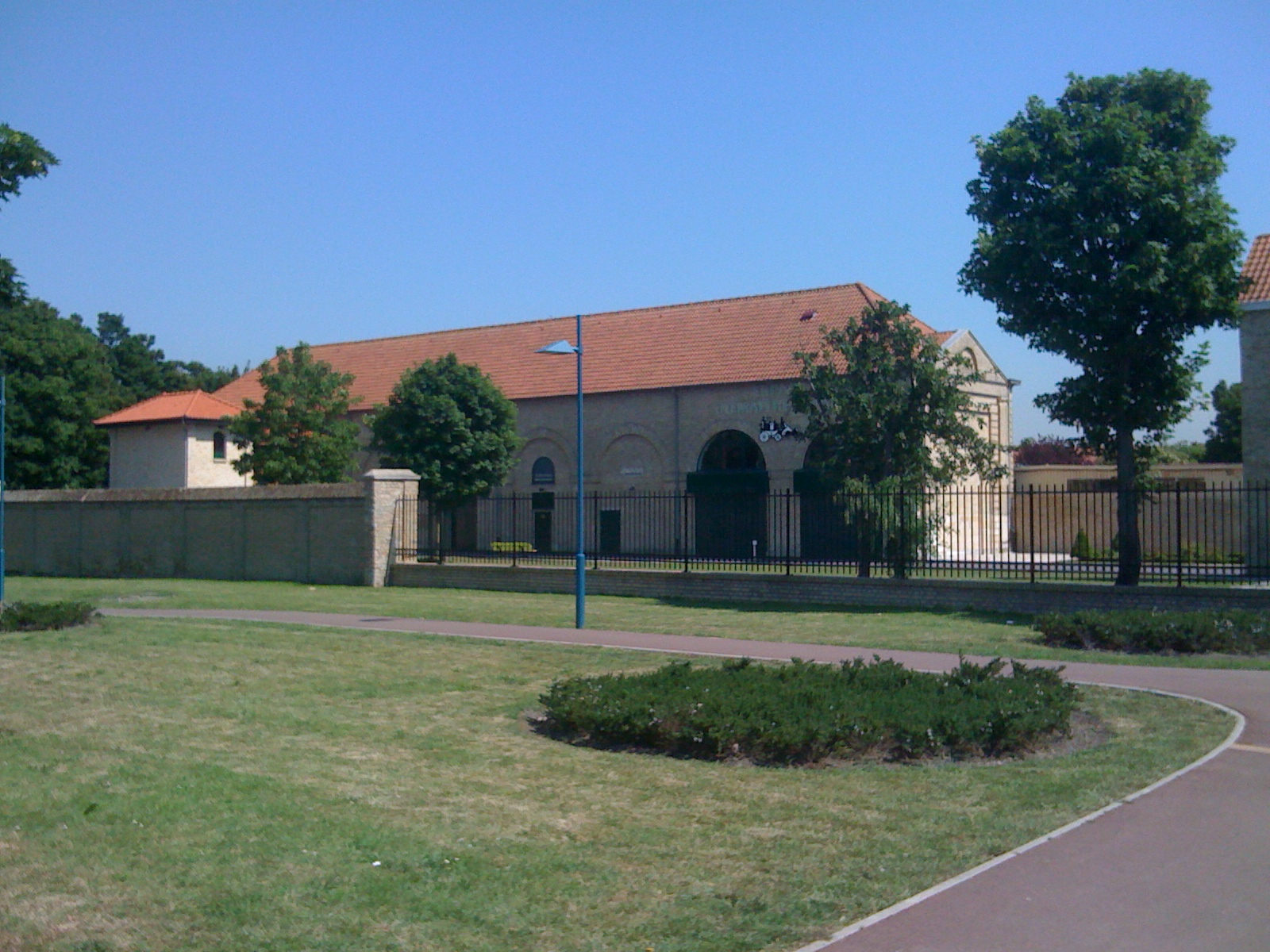 L'espace Maitre de Poste à Coudekerque-Branche (quartier St-Germaine)